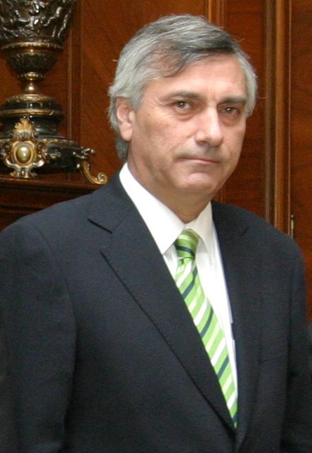 Foto del Economista manuel Marfan año 2008